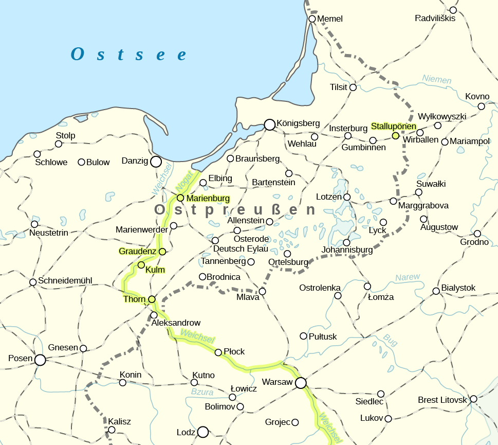 Karte der Weichsel-Nogat-Linie